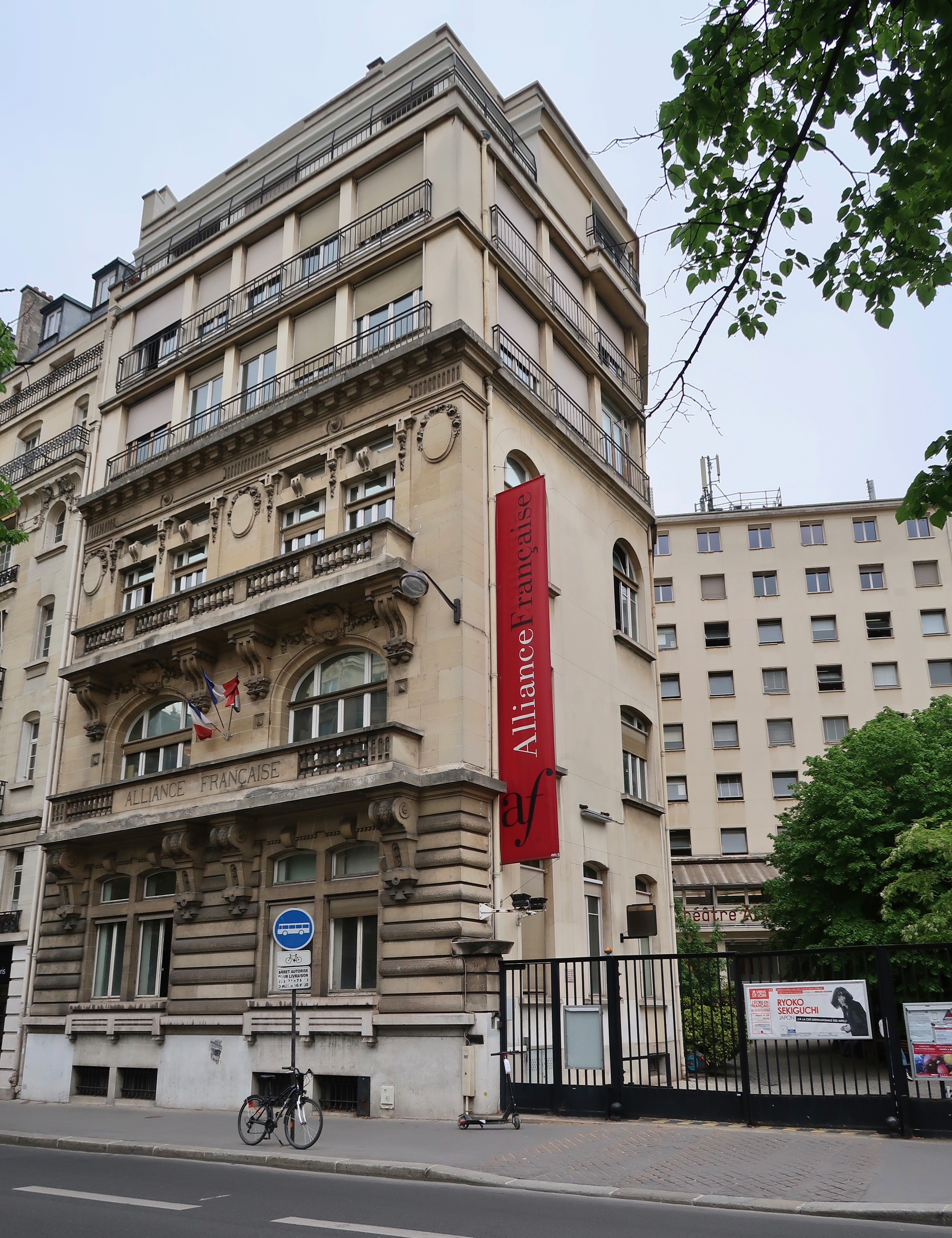 Alliance française, 101 boulevard Raspail (Paris, 6e).